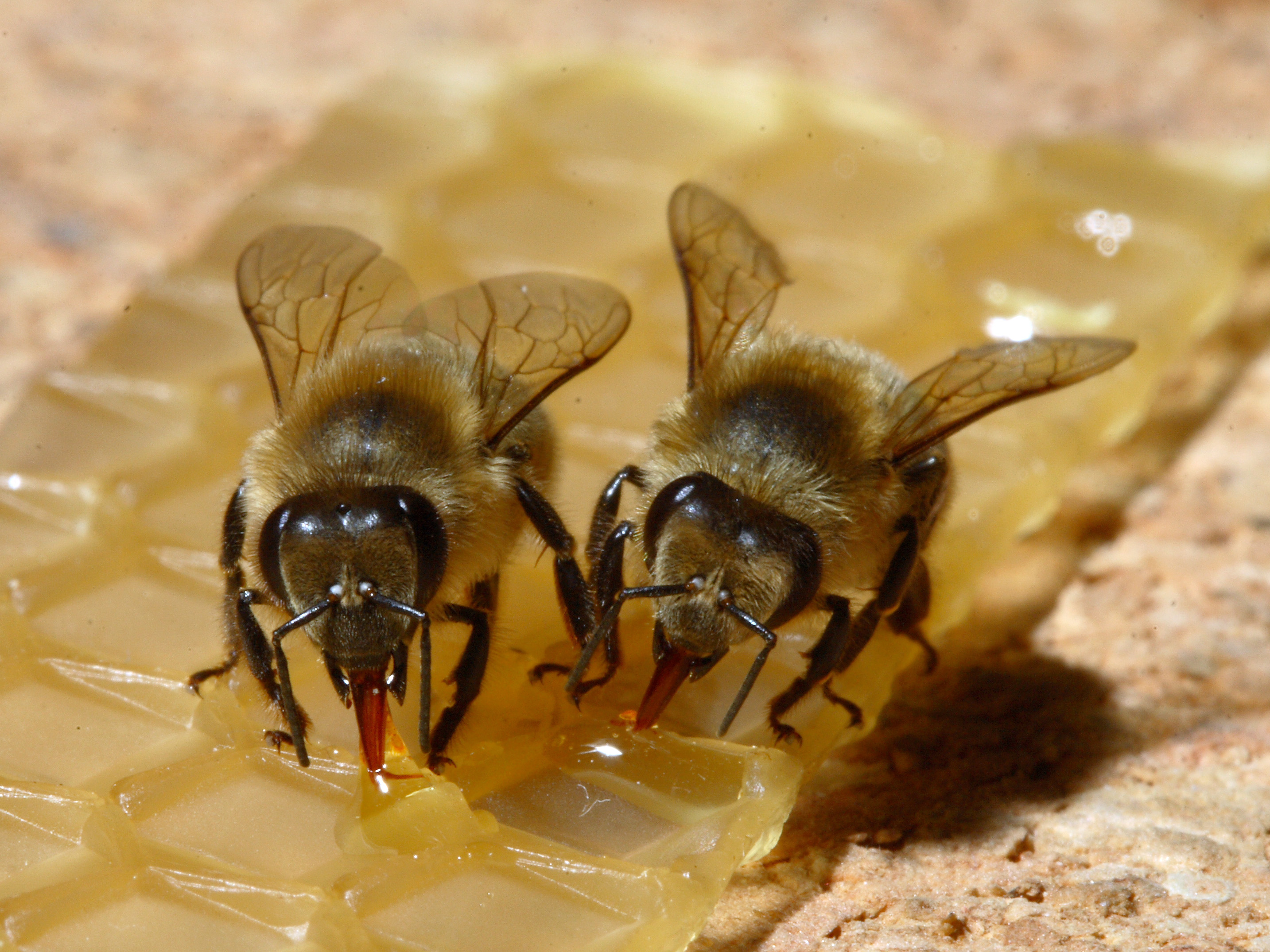 Westliche Honigbienen saugen an einem Honigtropfen